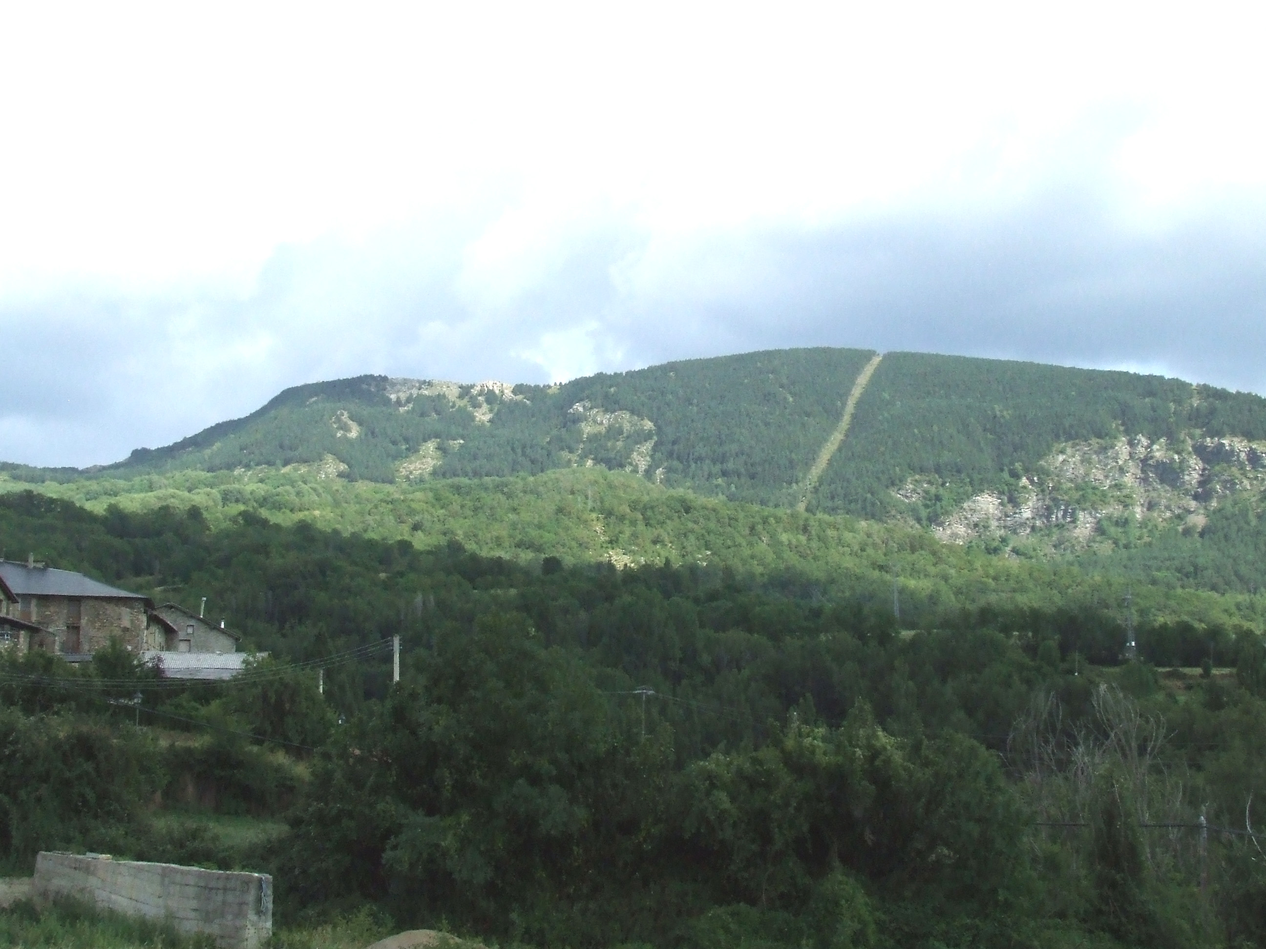 Tossal de Sant Quiri i Cap de la Ginebrera (Mont-ros, la Torre de Cabdella, Pallars Jussà)